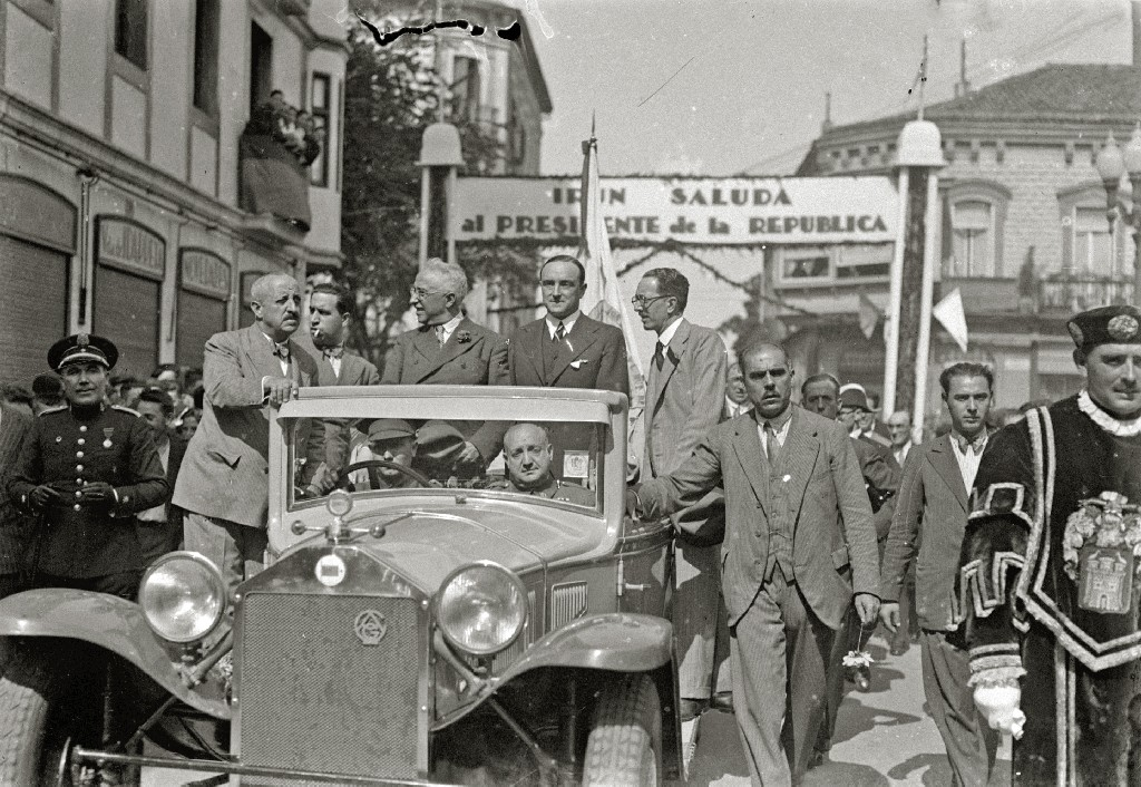 Título original: Visita de Niceto Alcalá Zamora a diferentes localidades guipuzcoanas (5/19) Descripción: Visita del presidente de la República, Niceto Alcalá-Zamora, a Irún el 14 de septiembre de 1932. Localización: Irún (Guipúzcoa)